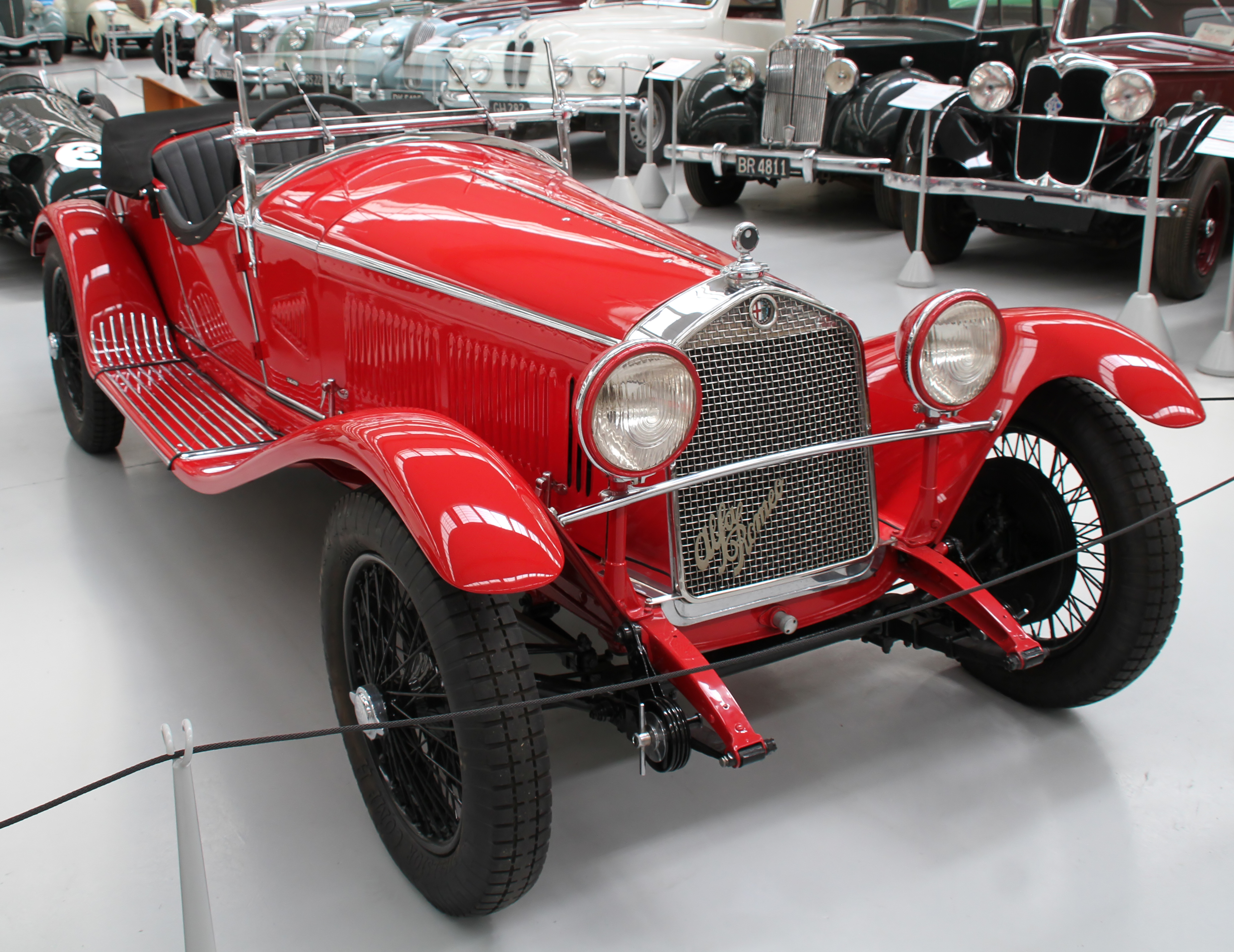 1930 Alfa Romeo 6c 1750 GS